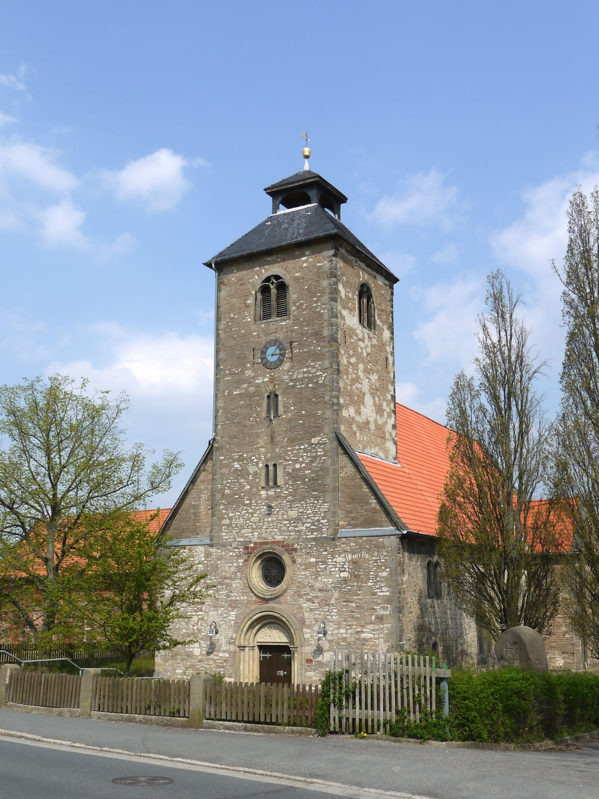 Evangelische St.-Nicolai-Kirche von Gebhardshagen (Ansicht von Westen)